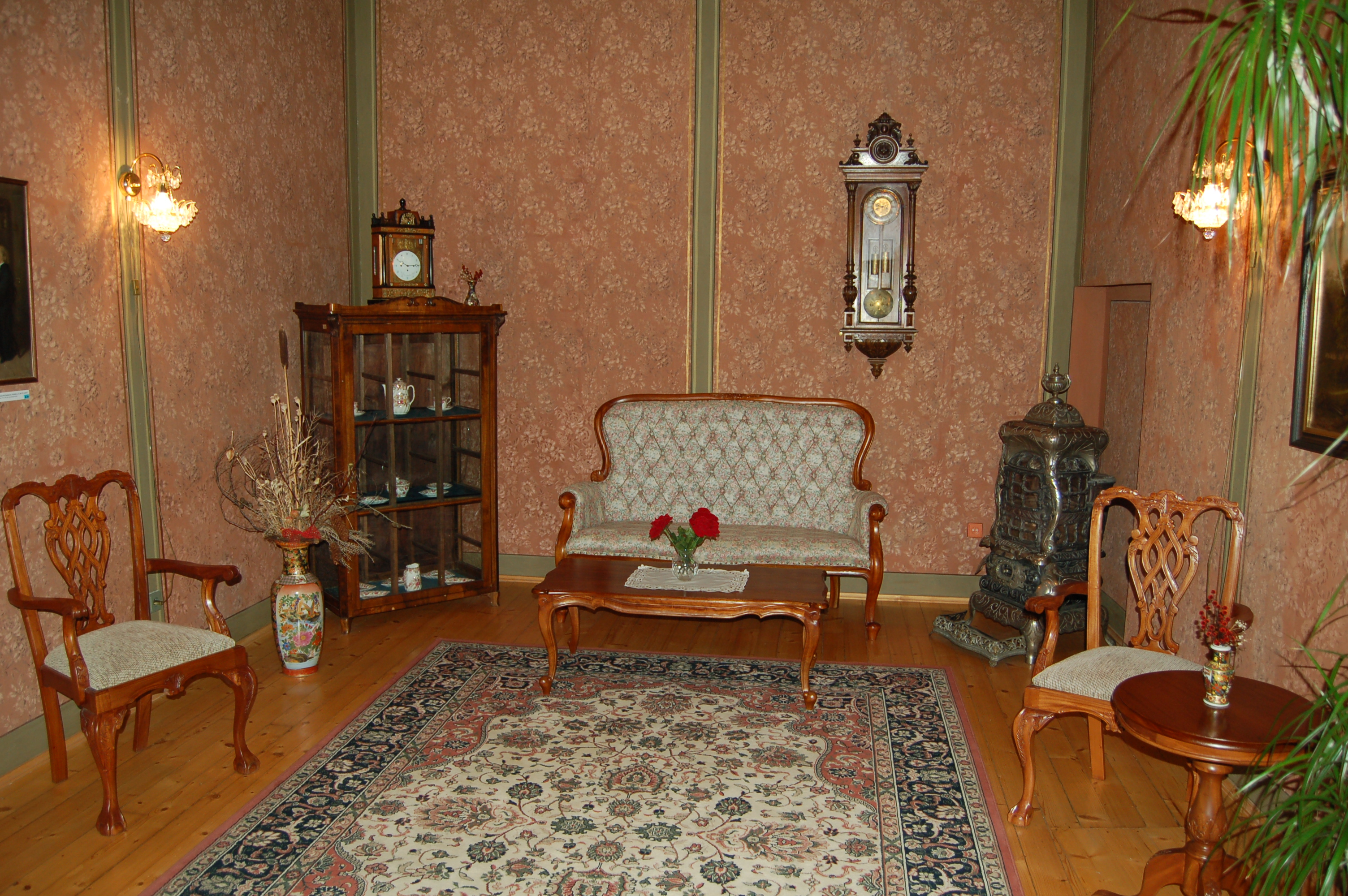 Interiéry Křížovy vily